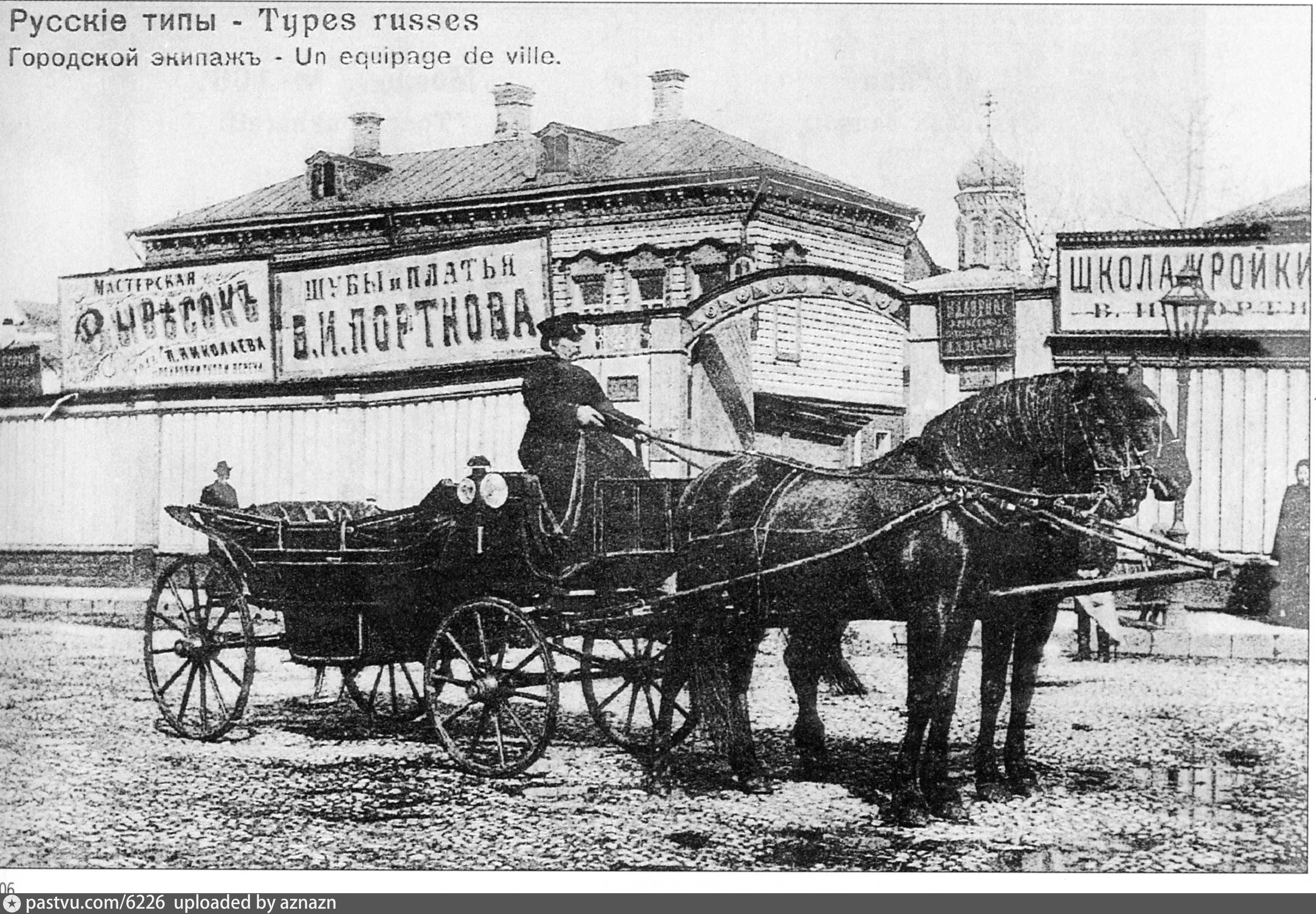 Участок строений, где построят Жилой Дом у Покровских ворот